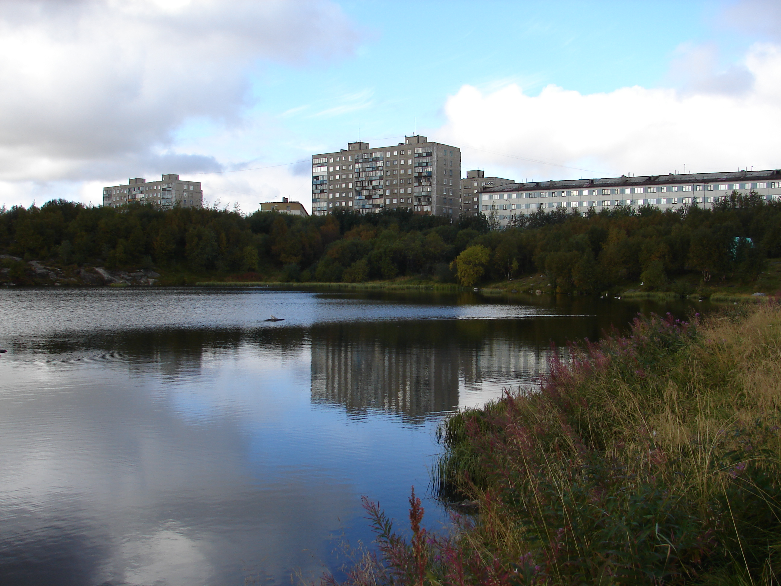 Семёновское озеро. Вид с востока